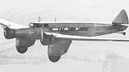 Das französische Post- und Passagierflugzeug Dewoitine D.332 Emeraude